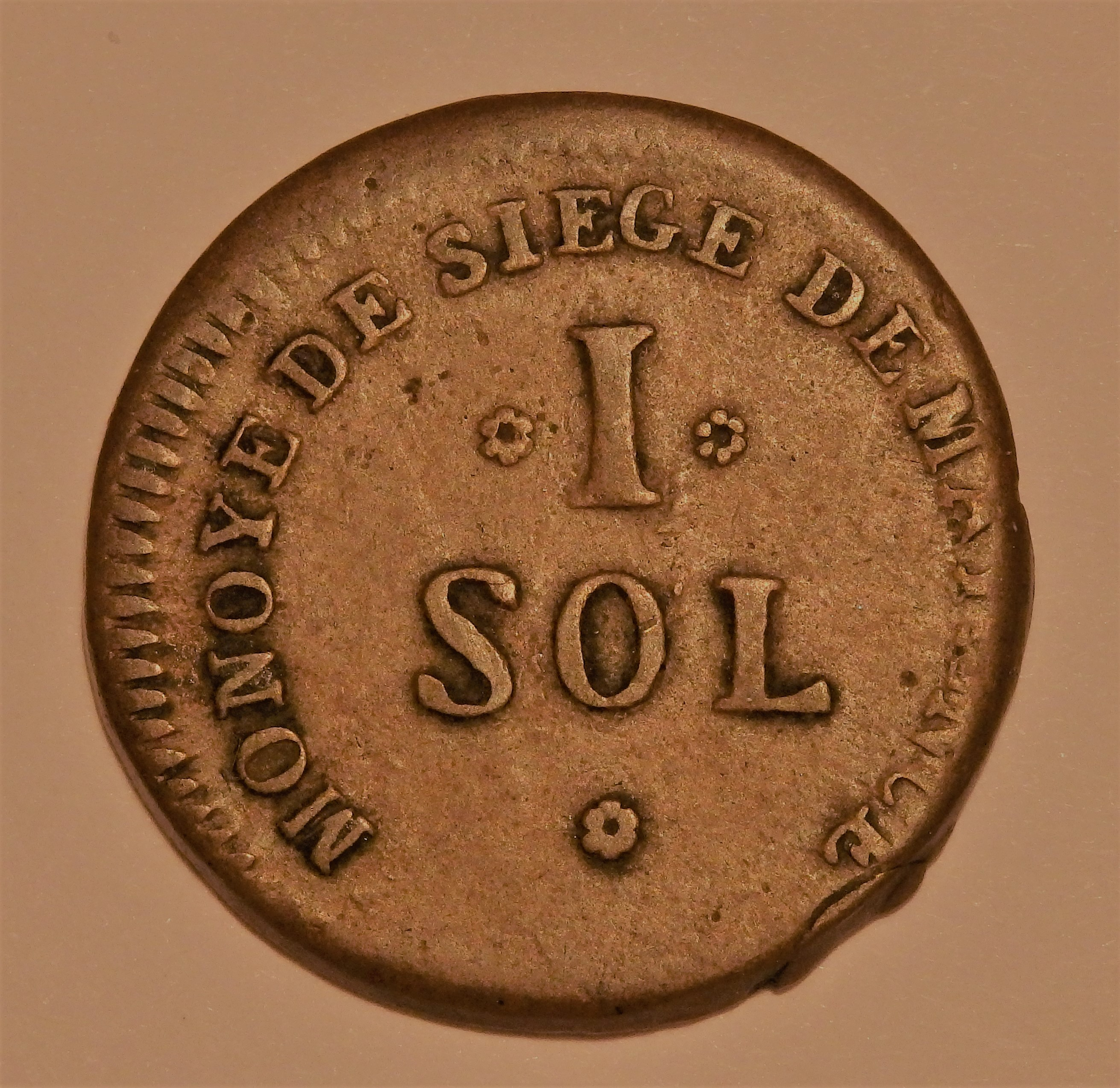 1 Sol von 1793, Wertseite